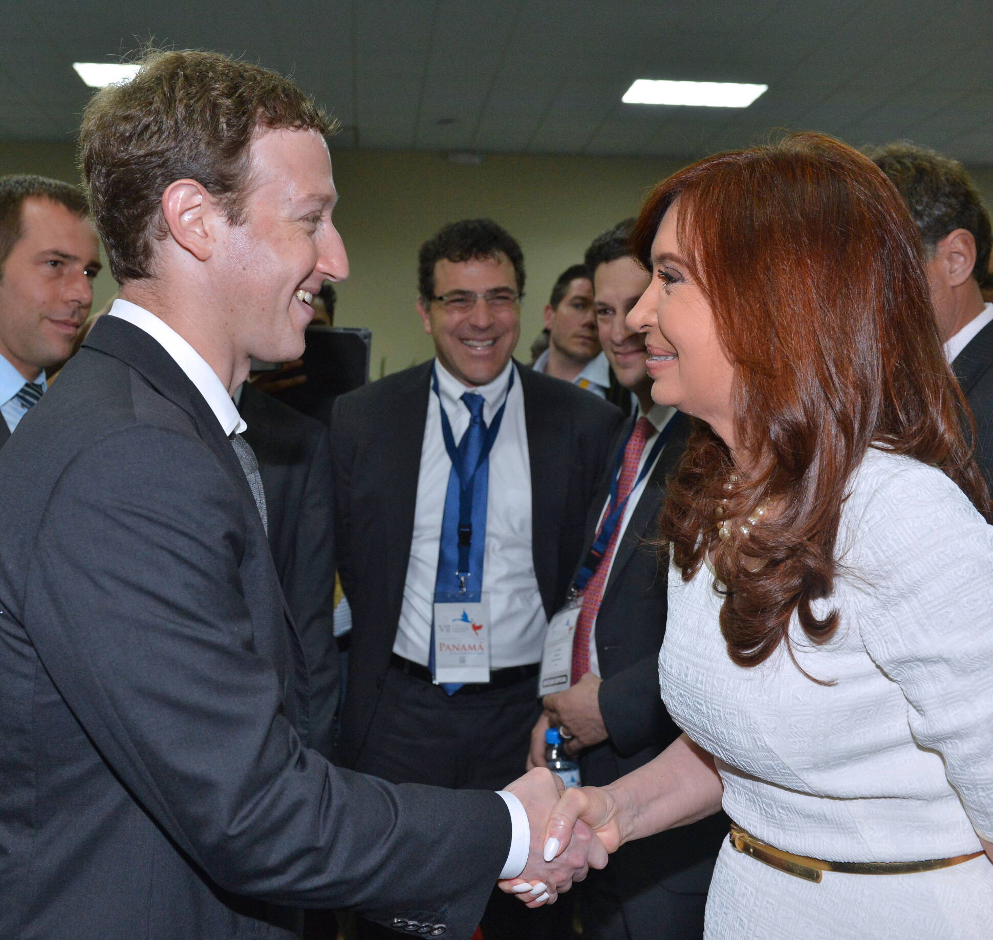 La presidenta Cristina Fernández se reunió hoy con el fundador de la red social Facebook, Mark Zuckerberg, con quien analizó políticas de innovación tecnológica, ciencia y tecnología, tras la reunión plenaria de la VII Cumbre de las Américas que se desarrolla en la ciudad de Panamá.